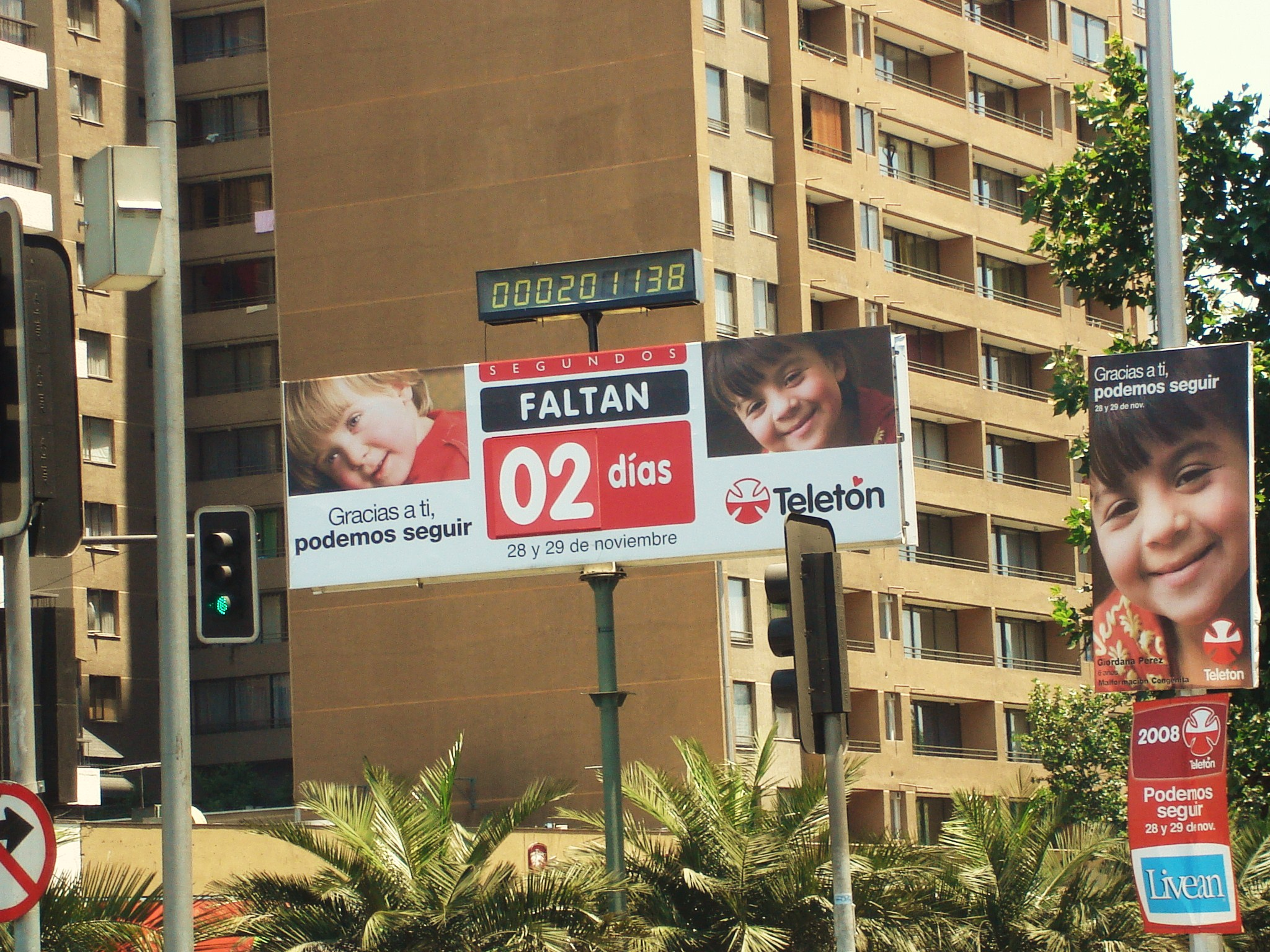 Letrero con el conteo de los días faltantes para la Teletón chilena ubicado en Plaza Baquedano, Santiago, Chile.